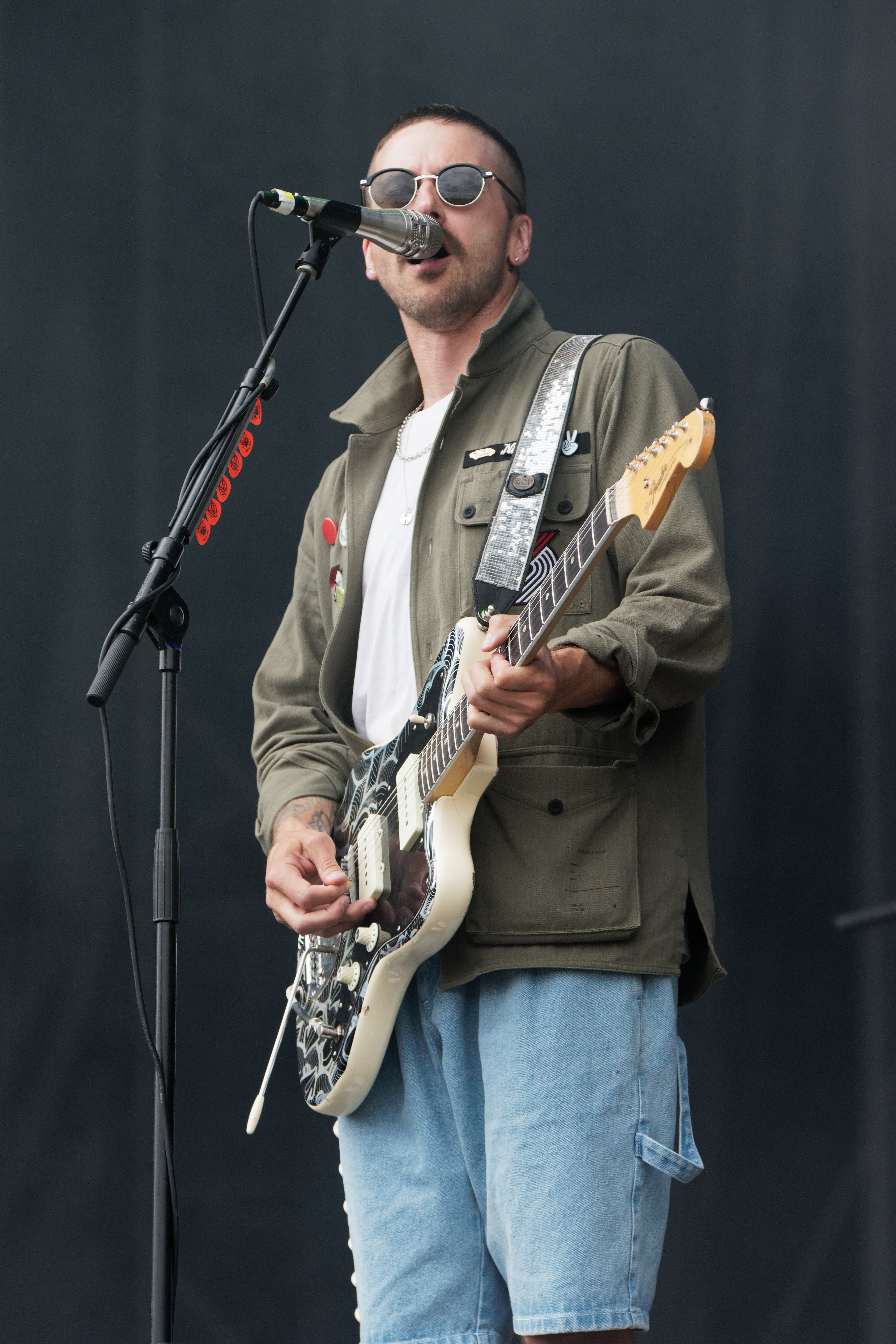 Portugal. The Man en concert lors du festival des vieilles charrues 2018.